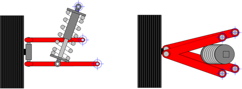 Dessin technique de suspension de type double triangulation, creer pour Wikipedia. Mai 2005 Guillaume Chane Sha Lin